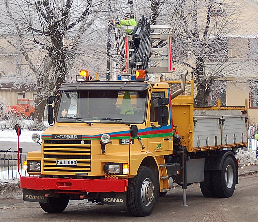 SCANIA T92H 4X2 50 Färg: GUL Fordonsår: 1986 Chassinummer: TH4X2Z01111350 Tekniska data Motornummer: Kaross: Flak - Lämmar Växellåda: MANUELL/TILLSATS Tjänstevikt, kg: 10180 Totalvikt, kg: 18500 Tillåten lastvikt, kg: 7820 Längd, mm: 7950 Bredd, mm: 2600 Drivmedel 1: DIESEL Motoreffekt, kw: 207